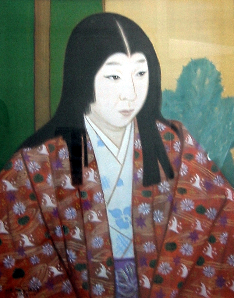 Nōhime岐阜城にて